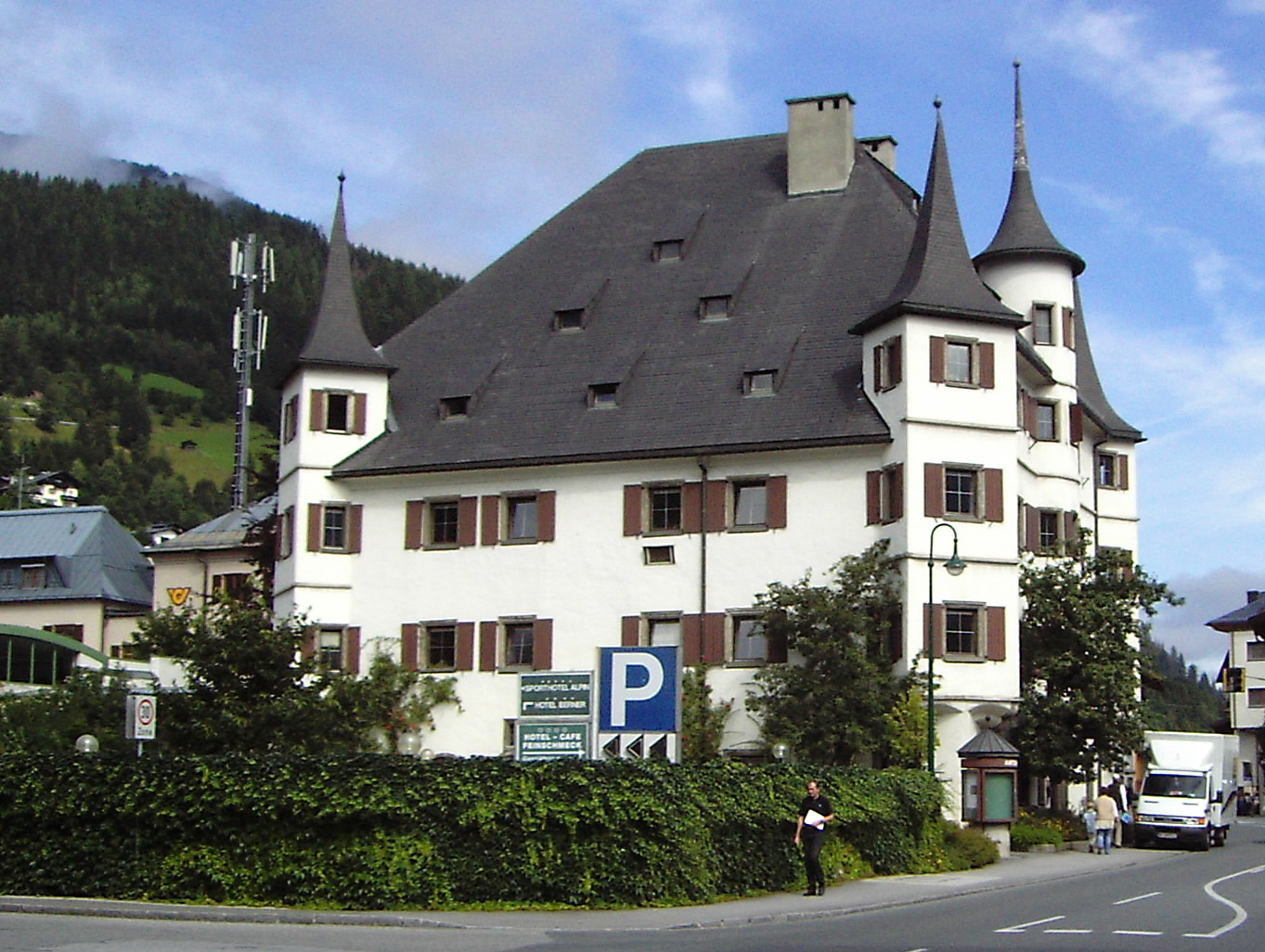 Town Hall (Former Castle Rosenberg) Of Zell am See, Salzburger Land - Austria